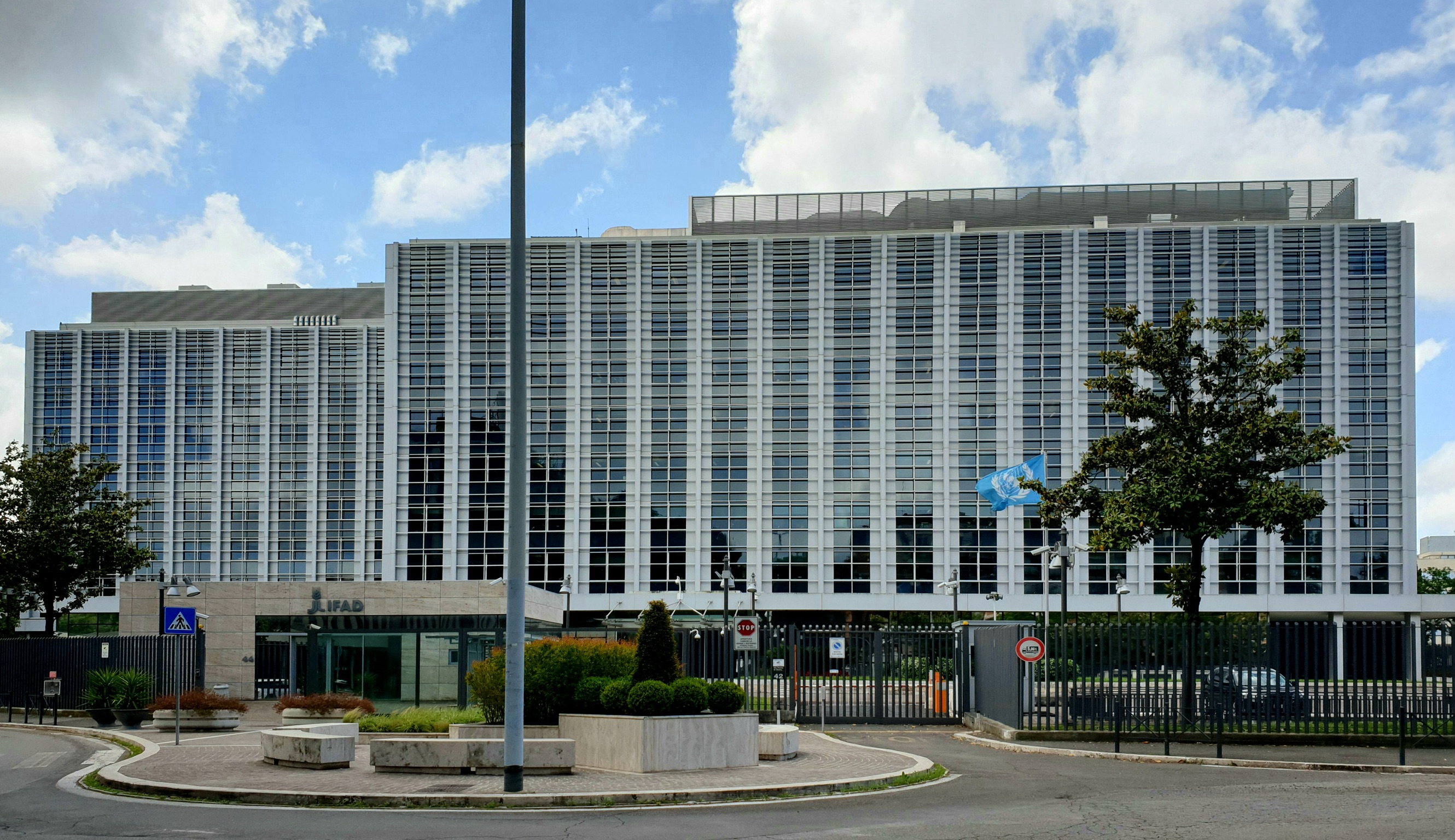 Sede centrale IFAD a Roma